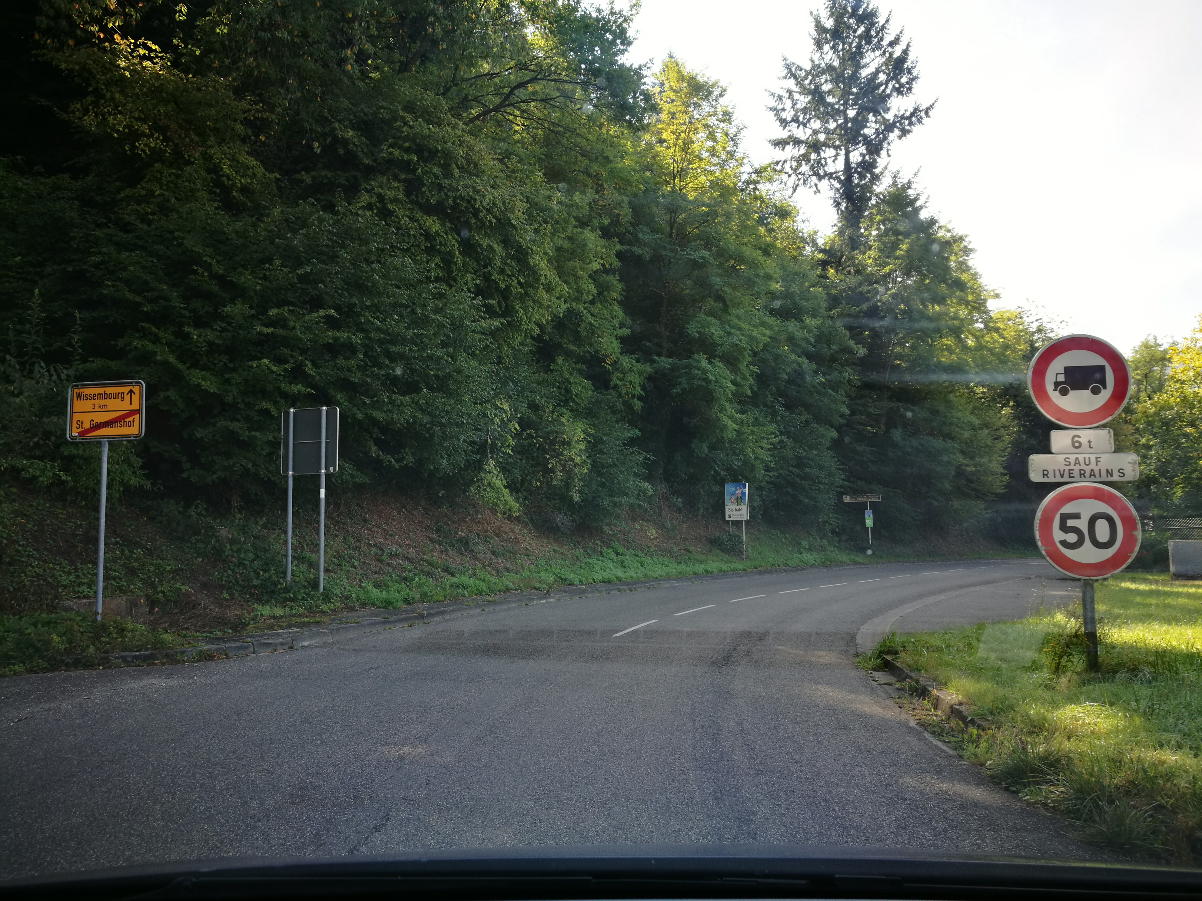 Deutschland (D) - Rheinland-Pfalz (RP) - Landkreis Südwestpflaz (PS) - Bobenthal - St. Germanshof: Grenzübergang nach Wissembourg in Frankreich (L478-D334)